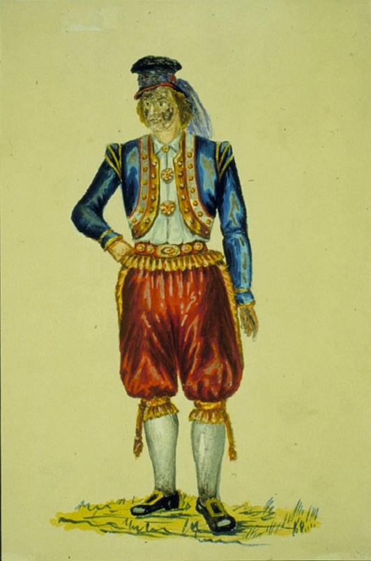 Olaf i Olaf Liljekrans